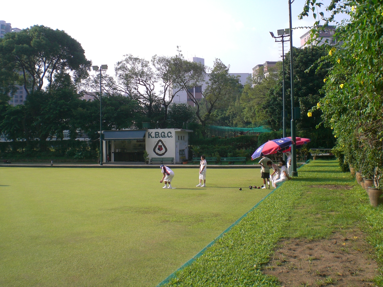 九龍草地滾球會, 佐敦, 柯士甸道, 覺士道交界.